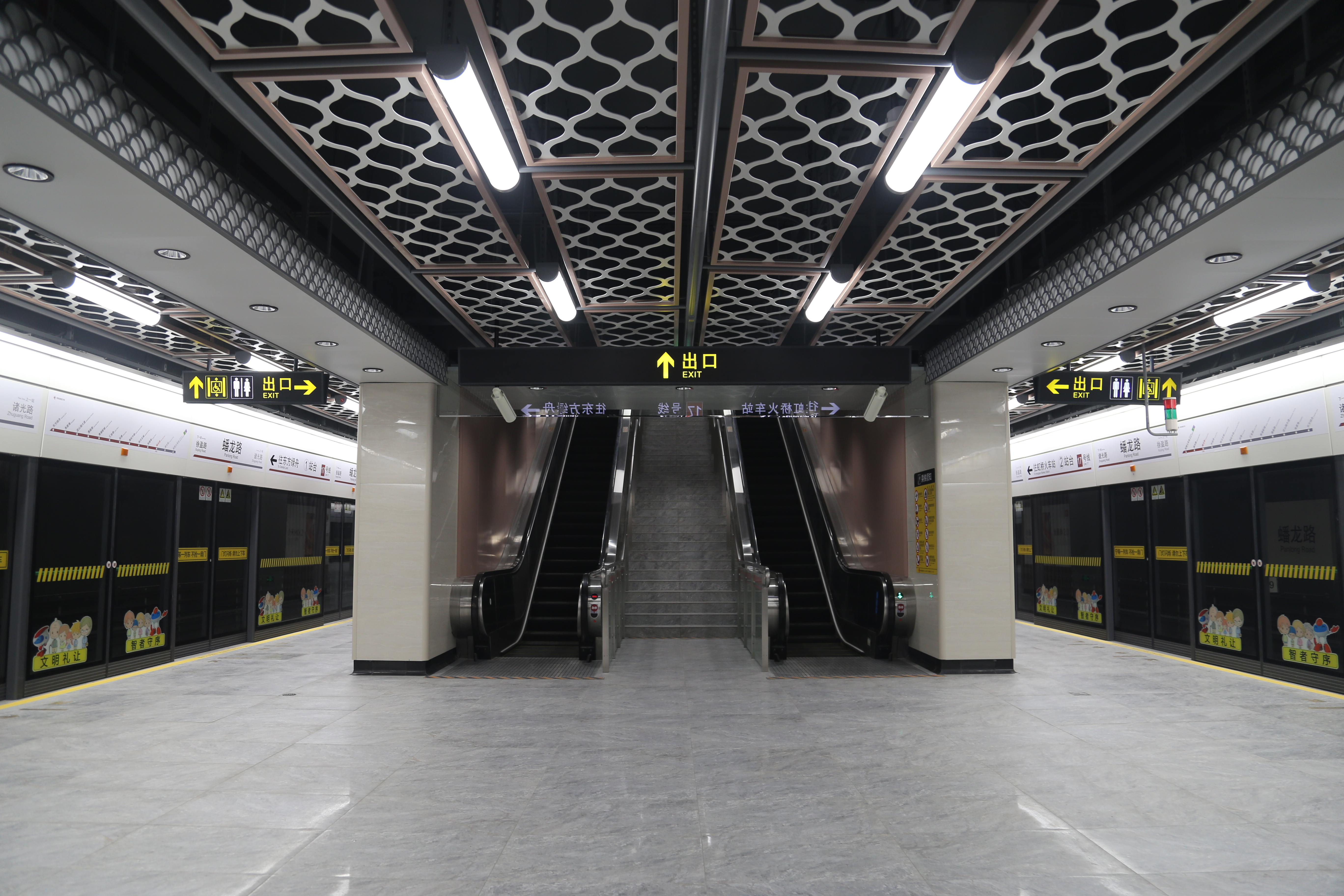 蟠龙路站站台